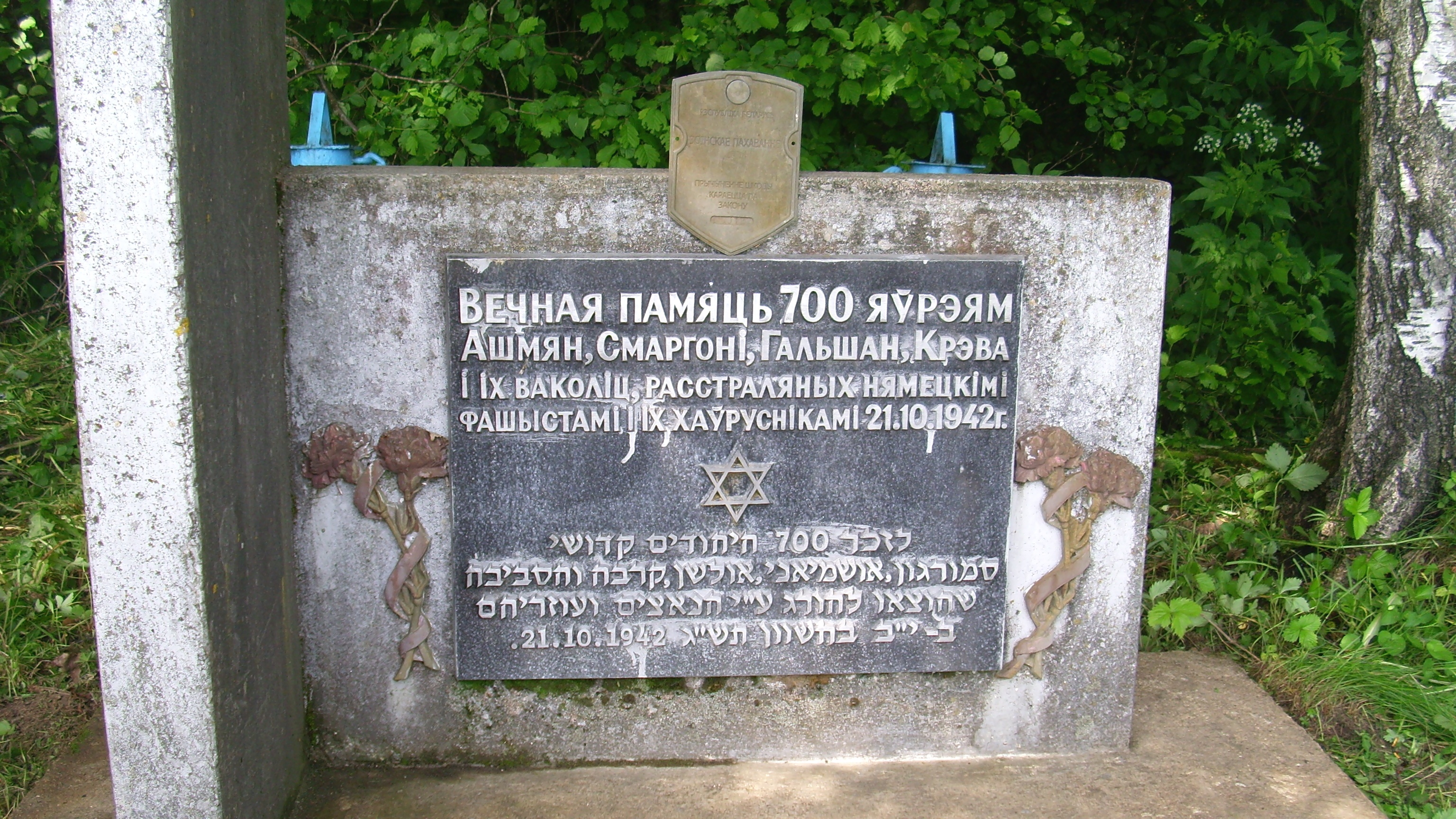 Памятник убитым во время Холокоста евреям у деревни Талминово (бывший хутор Углеева - он же Угливо, он же Аглейбы) Ошмянского района. Установлен в 1950 году.